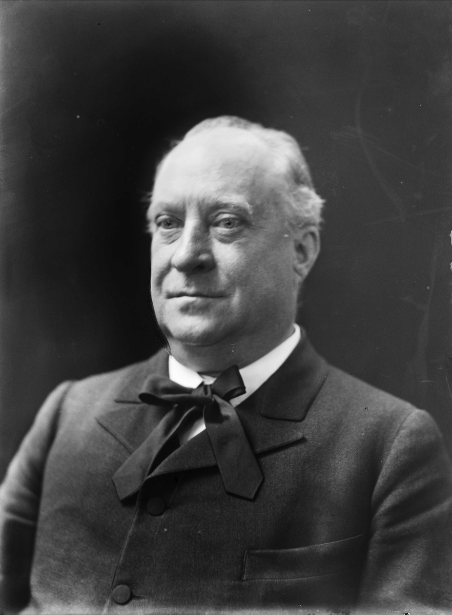 Statsråd Birger Kildal